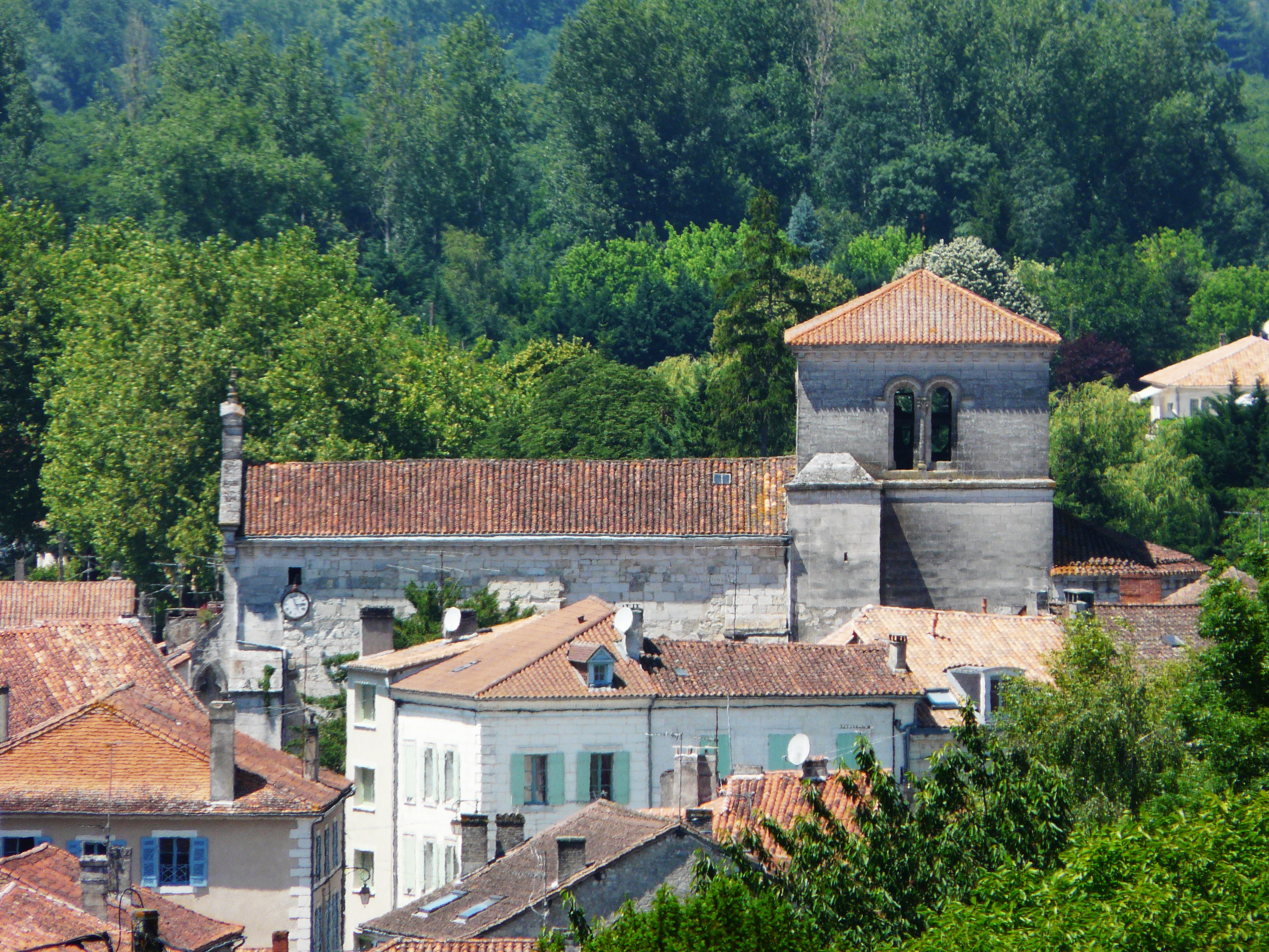 L'église Saint-Martin vue du sud-est, Lisle, Dordogne, France.